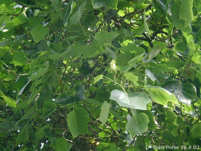 Liriodendron tulipifera